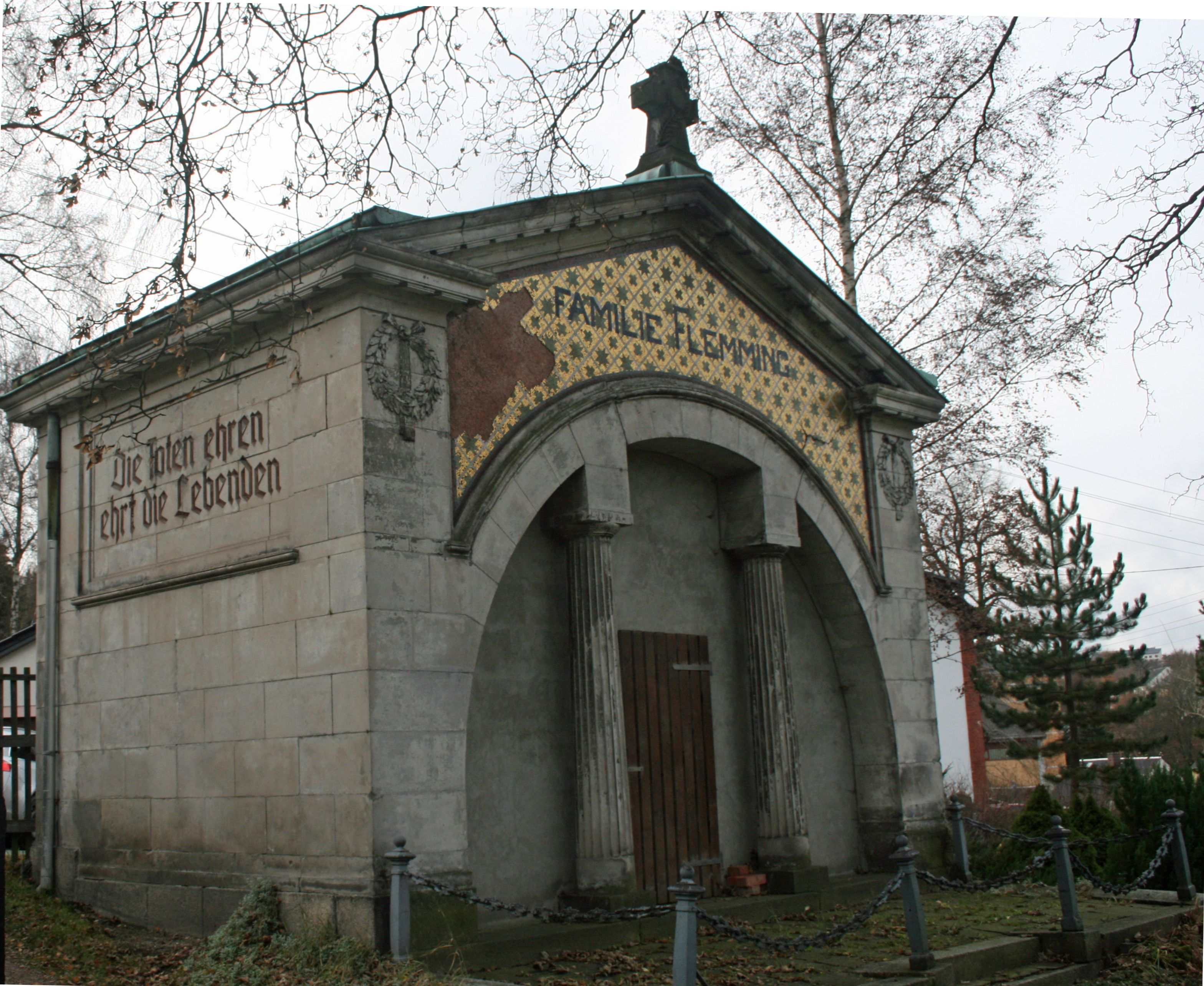 Schönheide im Erzgebirge: Mausoleum der Familie Flemming, früher Inhaber der größten Bürstenfabrik in Schönheide.Bis zum Jahr 1838 war ein Teil der Fläche des heutigen Marktplatzes und die, auf der seit 1882 das Rathaus steht, der Schönheider Friedhof. Der 1838 angelegte und 1883 erweiterte Friedhof am Rathausberg in der Trägerschaft der Evangelisch-lutherischen Kirchgemeinde Schönheide war bis zum Jahr 1995 Friedhof für die Schönheider, ob sie Mitglied der Schönheider Kirchgemeinde, anderer evangelisch-lutherischer Kirchengemeinden, Mitglied der römisch-katholischen Kirche oder keiner Religionsgruppe angehörten. 1908 wurde die Friedhofskapelle gebaut. Nach der Entfernung fast aller Grabsteine im Jahr 2015, also 20 Jahre nach den letzten Beerdigungen, stehen auf der parkartigen Fläche nur noch die als Kulturdenkmale eingestuften Grabstätten (Gruften) der früheren Eigentümer der Eisengießerei Schönheiderhammer, Familie von Querfurth, und die einiger anderer Familien, denen früher größere Bürstenfabriken gehörten, Familien Flemming und Oschatz. Außerdem gibt es noch einige Grabmäler anderer Familien, so die der Familie C. G. Tuchscherer (Textilien) und Lenk (Bürsten). Sie sind in mehr oder minder stärkerem Verfall und werden nur sehr eingeschränkt unterhalten. Heute wird dieser Friedhof als "alter Friedhof" bezeichnet. Vom Jahr 2016 an wurde er als Park umgestaltet.